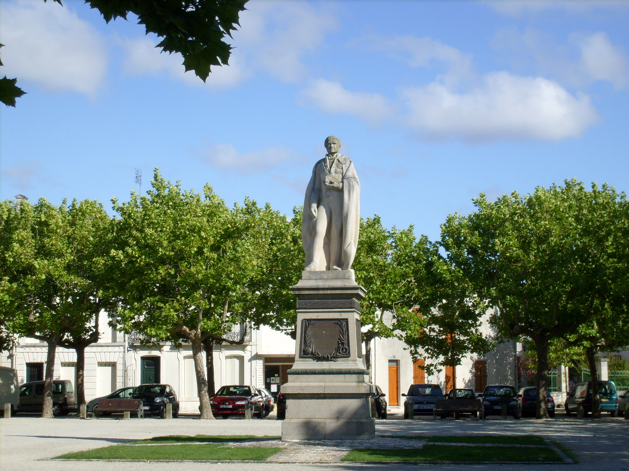 Place Chasseloup-Laubat à Marennes